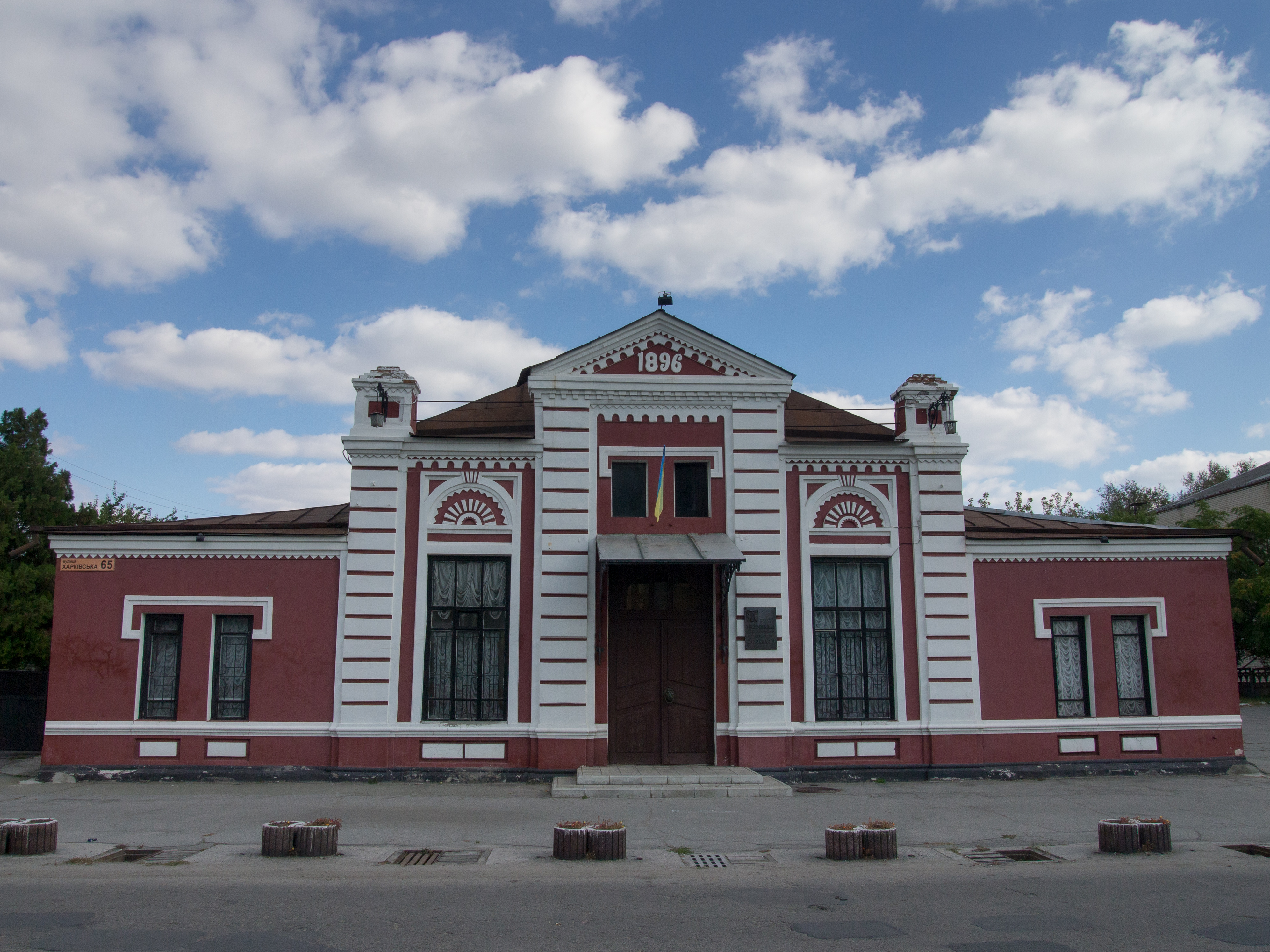 Графський театр, Павлоград, вул.Харківська, 65